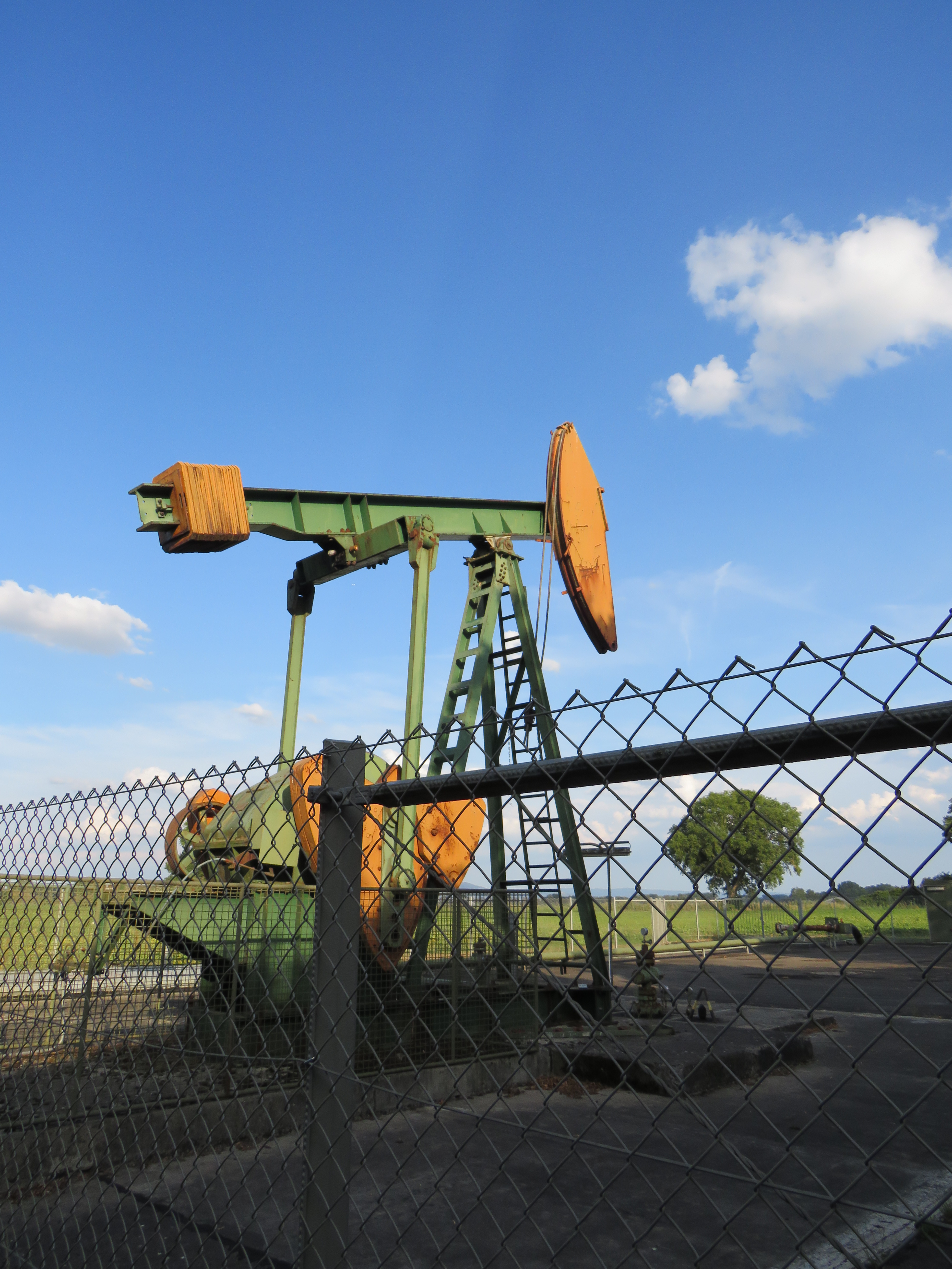 Pferdekopfpumpe der Bohrung E 23 in Eich (Rheinland-Pfalz). Die Anlage war zum Zeitpunkt der Aufnahme außer Betrieb.